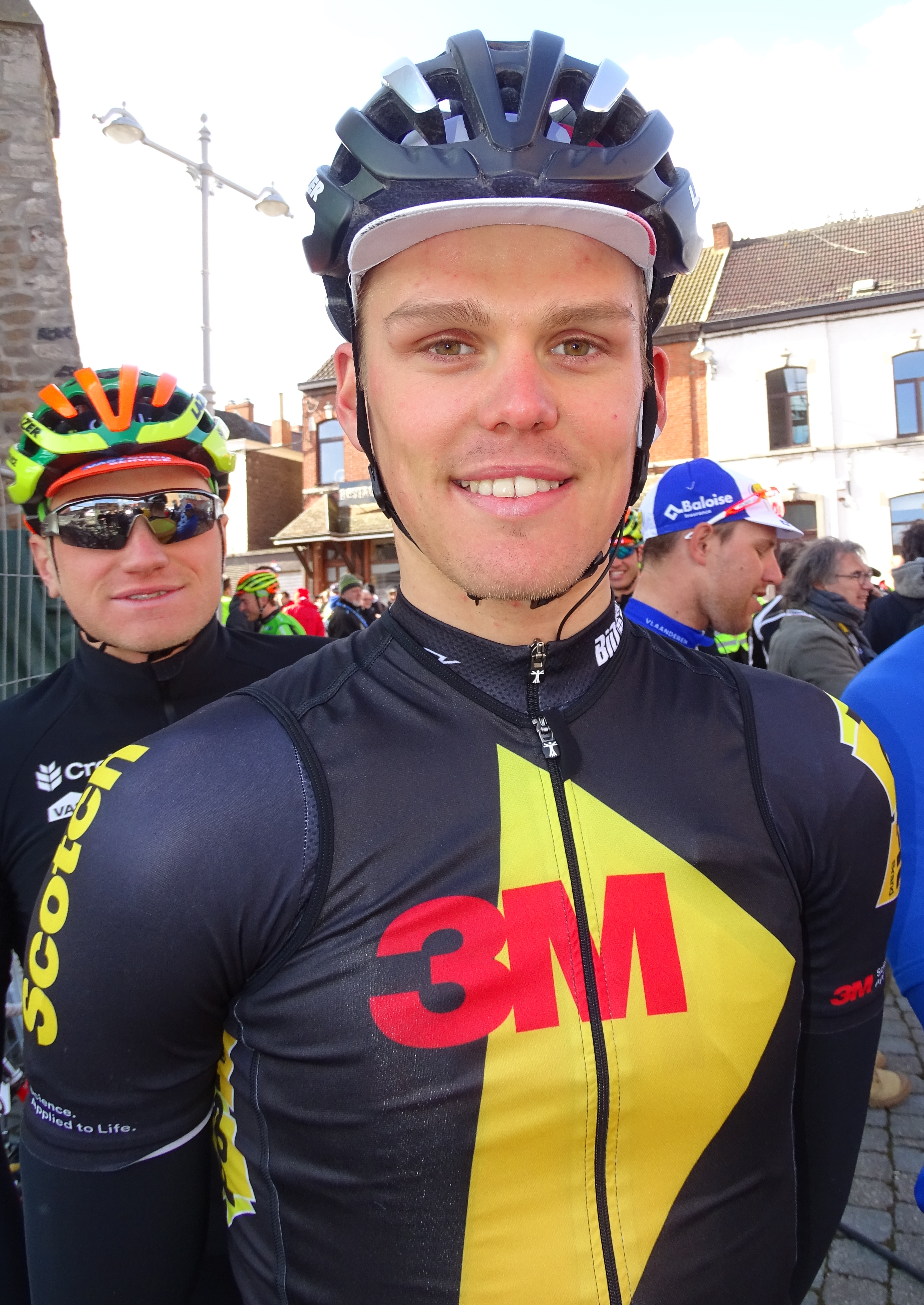 Reportage réalisé le mercredi 2 mars à l'occasion du départ du Samyn des Dames 2016 et du Samyn 2016 à Quaregnon, Belgique.